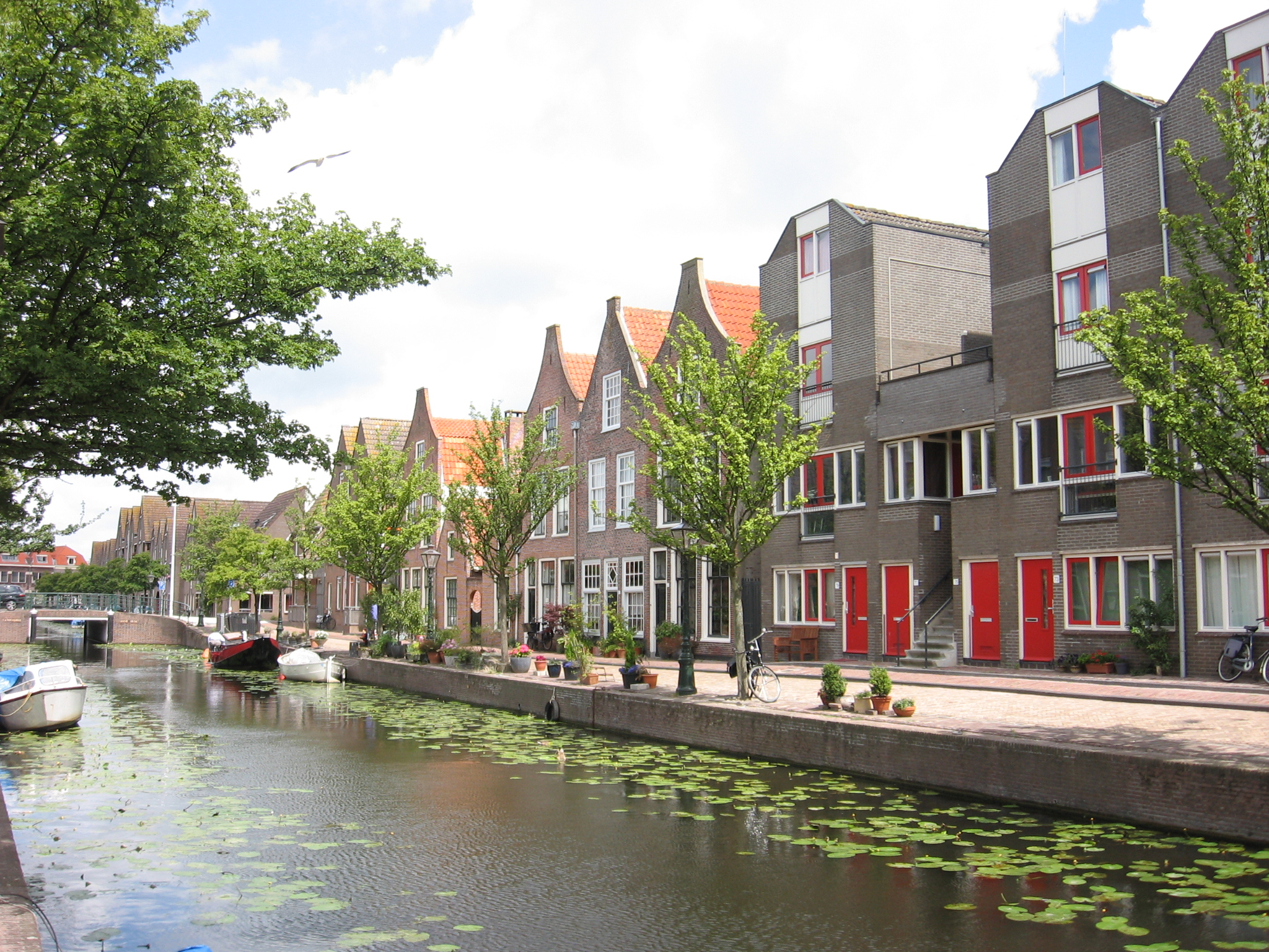 Oranjegracht Leiden.jpg